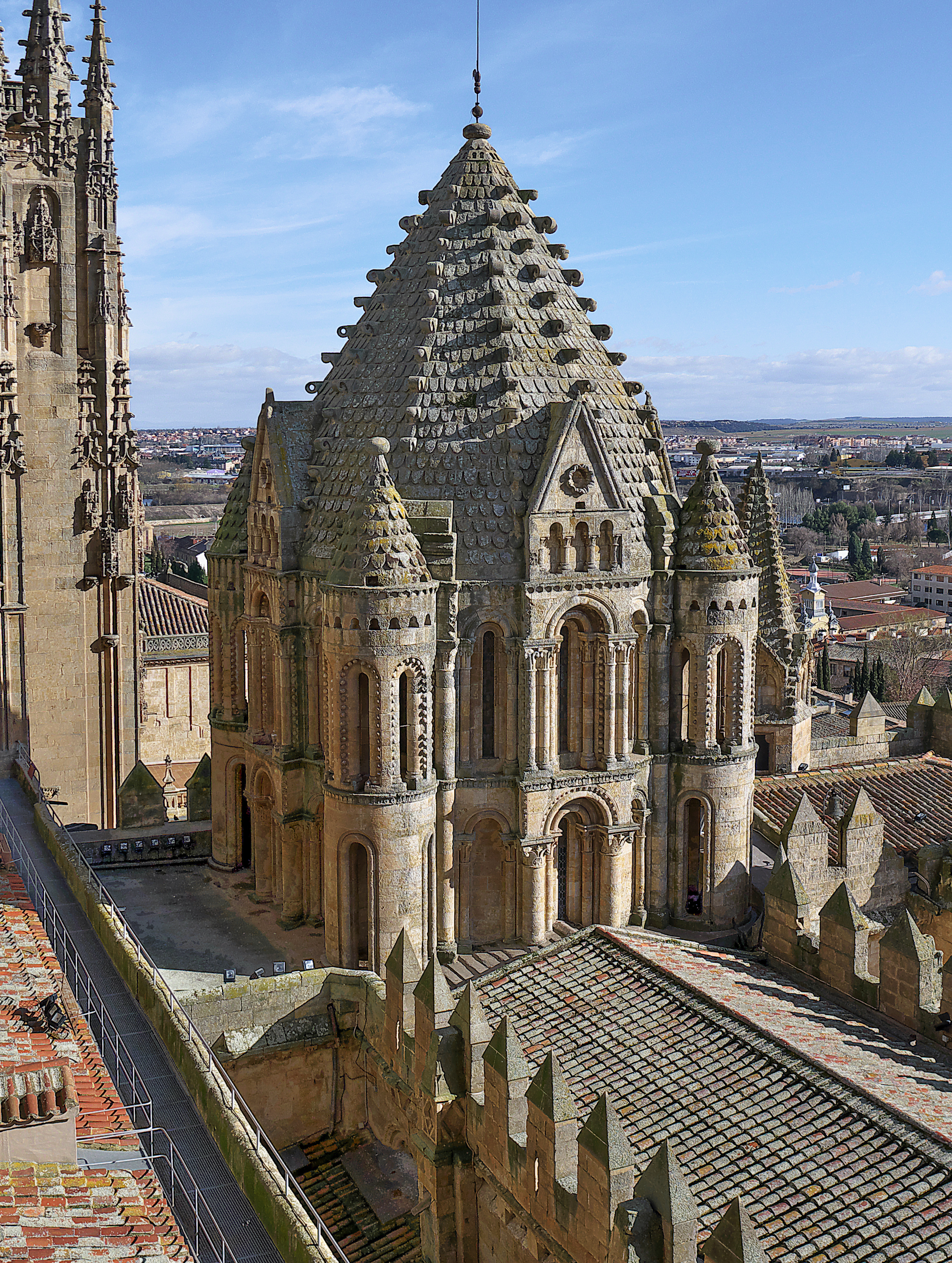 Catedral Vieja de Salamanca. Cimborrio (h. 1200-1220), de clara influencia bizantina y posiblemente, realizado por maestros franceses de la zona de Poitiers. Campanario de la Iglesia de Notre-Dame la Grande (Poitiers) Iglesia de Notre-Dame la Grande (Poitiers)